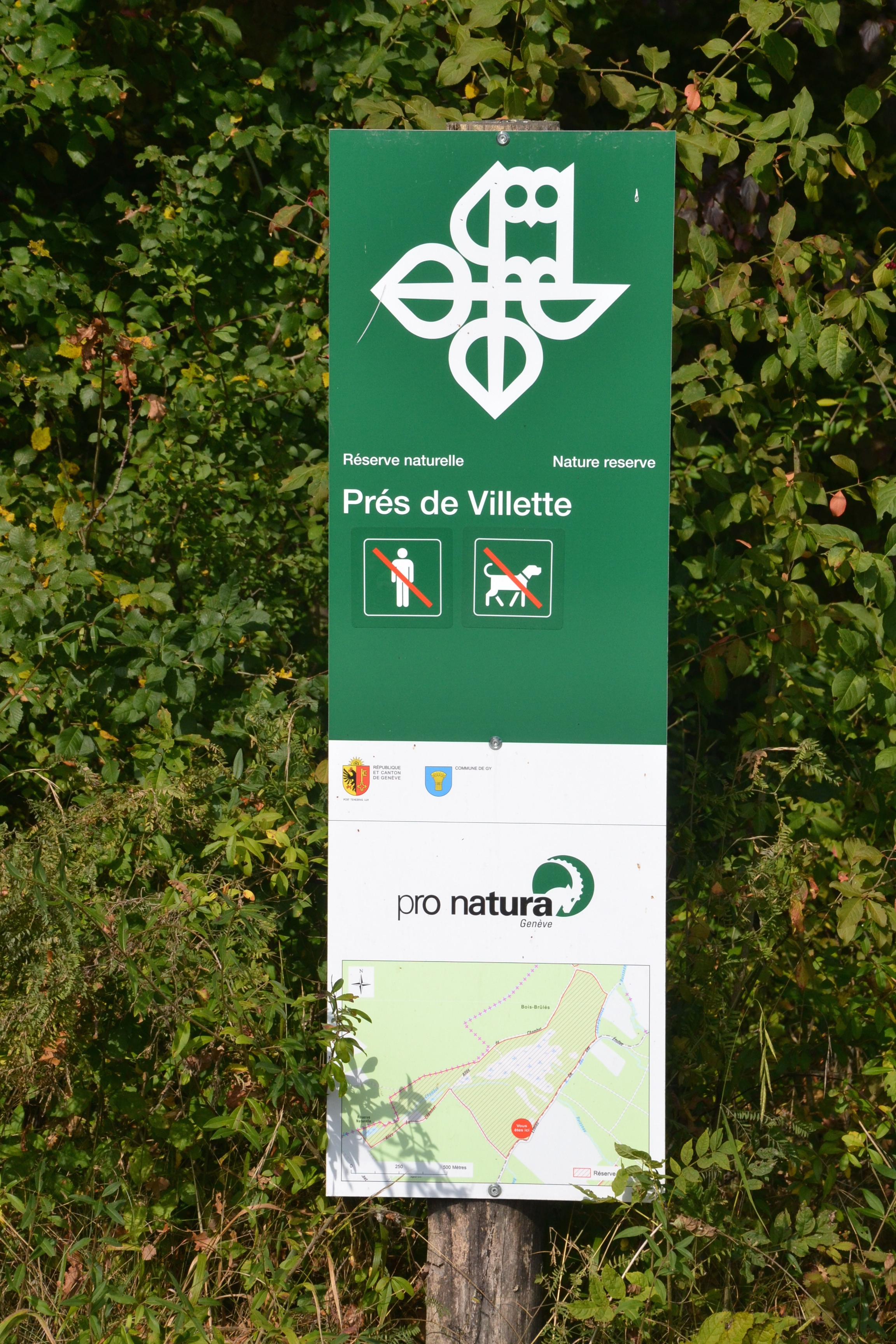 Panneau de la réserve naturelle des près de Villette (Jussy, GE, Suisse).